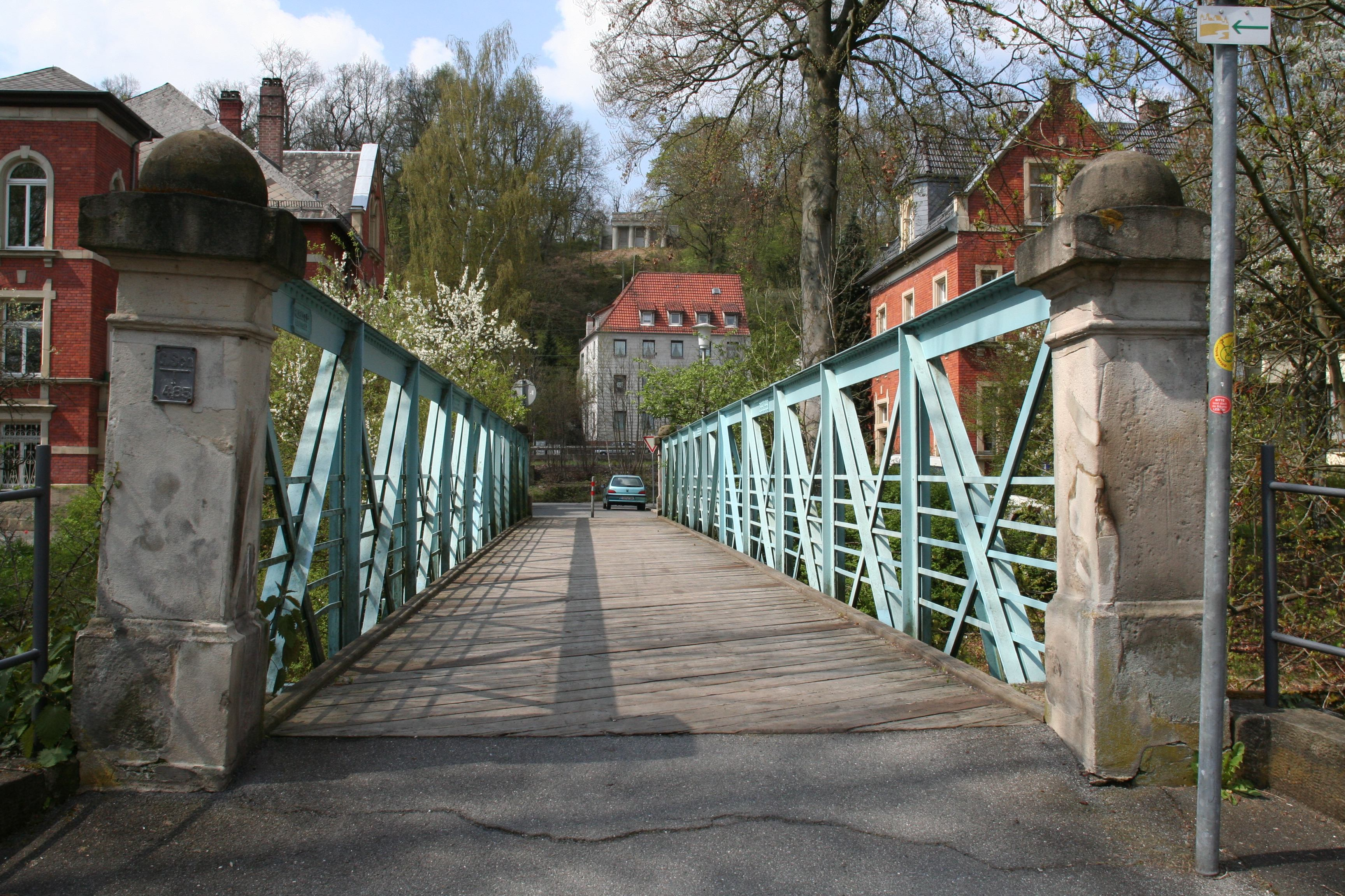 Brockardt-Brücke am Mühldamm in Coburg